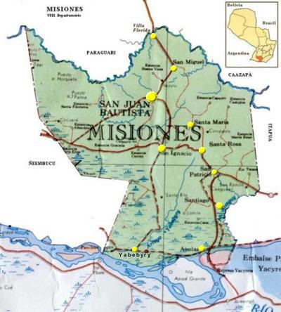 Mapa de misiones